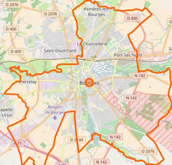 Limites administratives de Bourges.